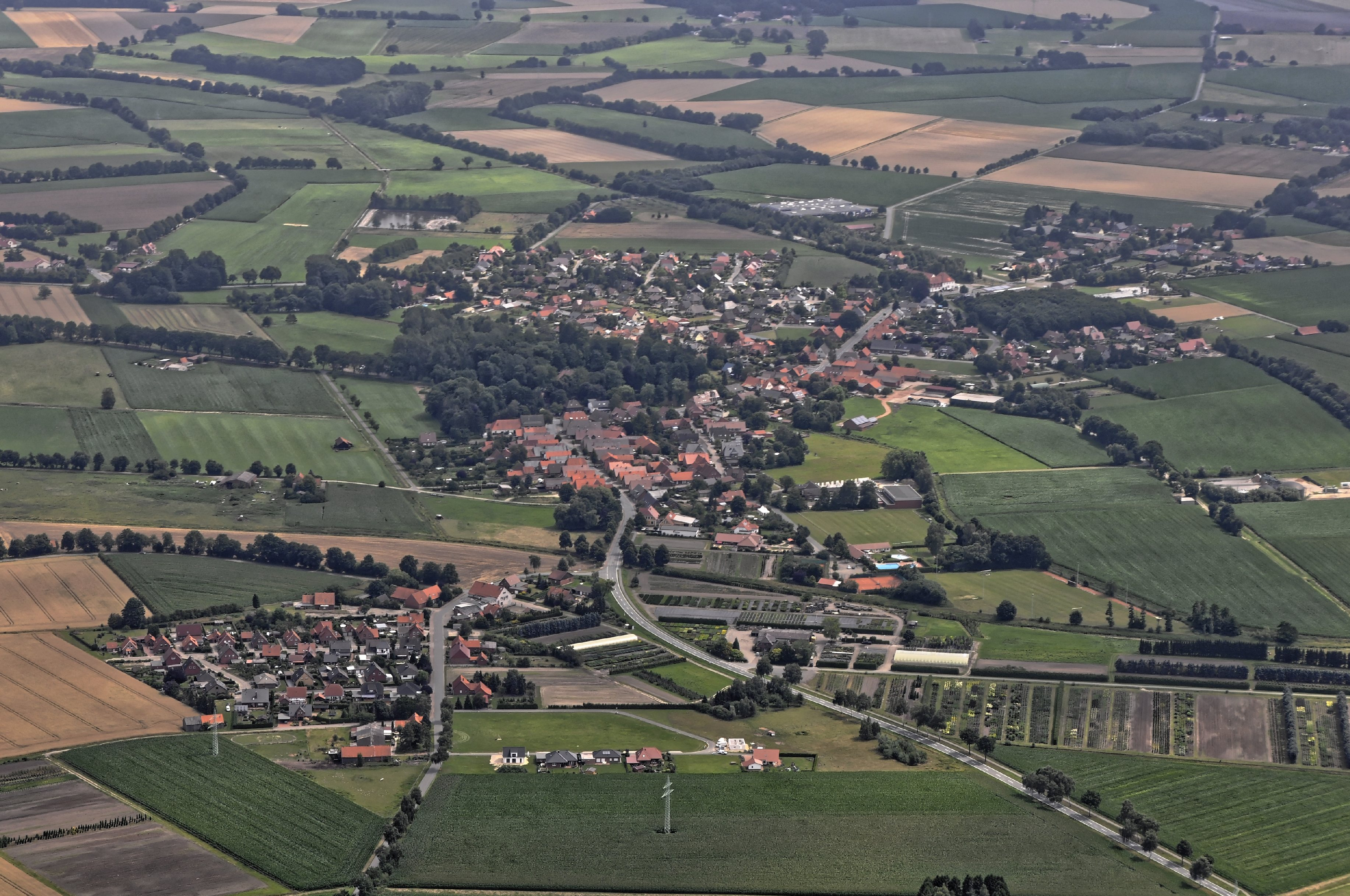 Bilder vom Flug Nordholz-Hammelburg 2015: Blick von Westen auf Siedenburg.